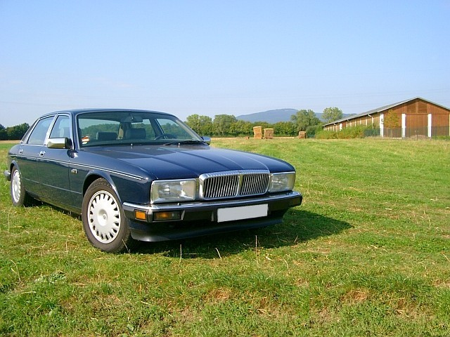 Daimler XJ40 (1988) 3,6l; Eigenes Foto